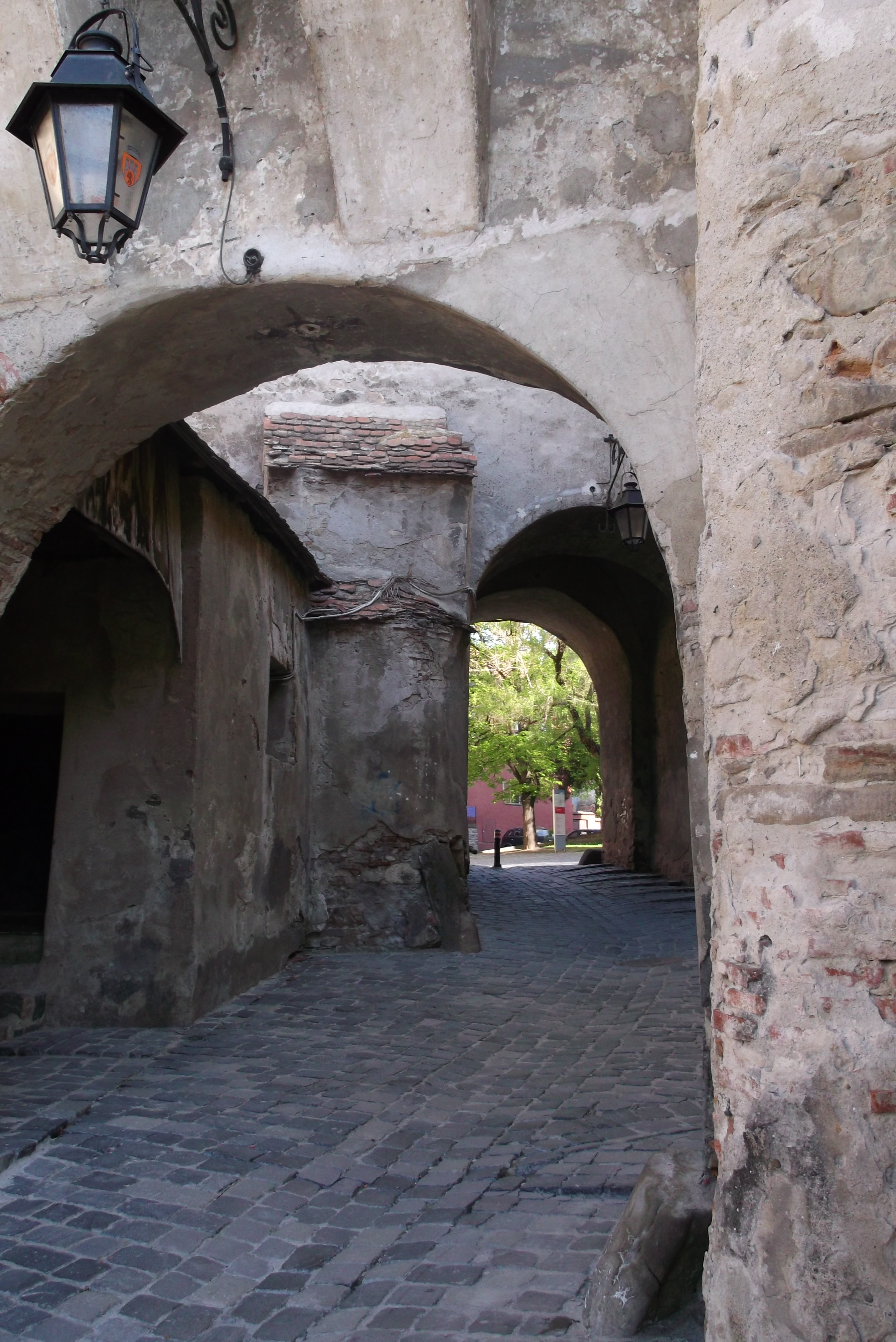 Rumunia, Sighişoara